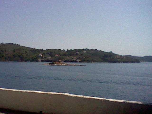 Tο νησάκι Δασκαλονήσι